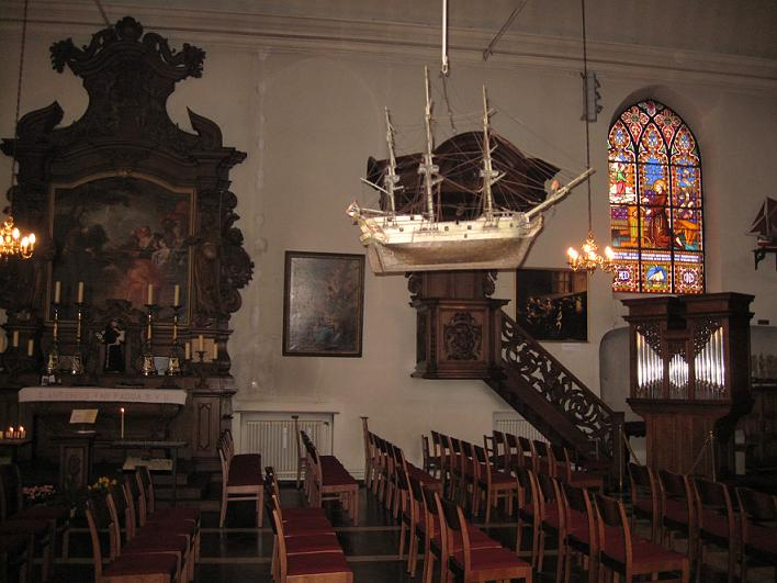 Vue de l'intérieur de l'églises des Capucins d'Ostende avec une maquette de corvette du 18e siècle